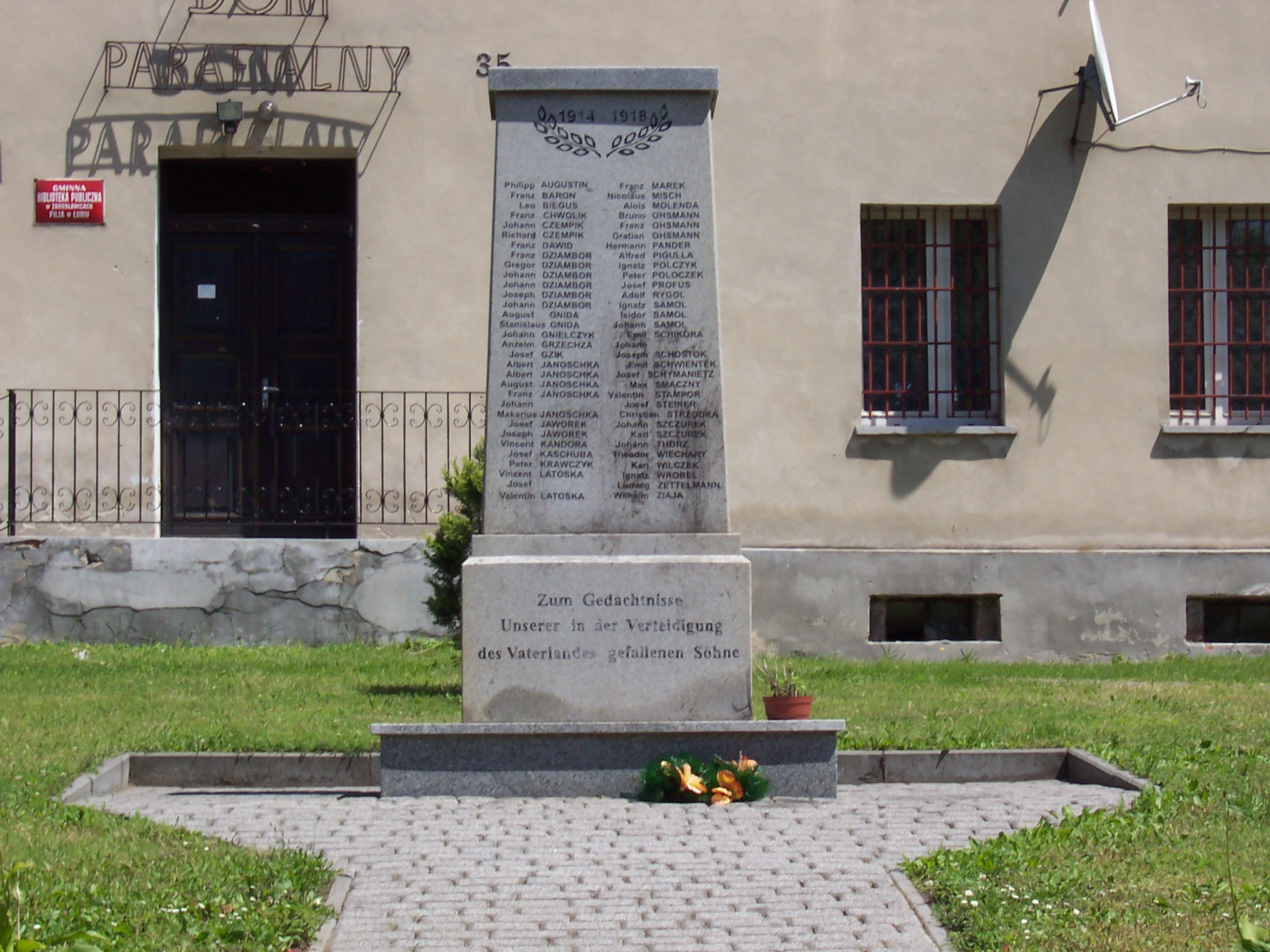 Niemiecki pomnik wojenny w Łubiu